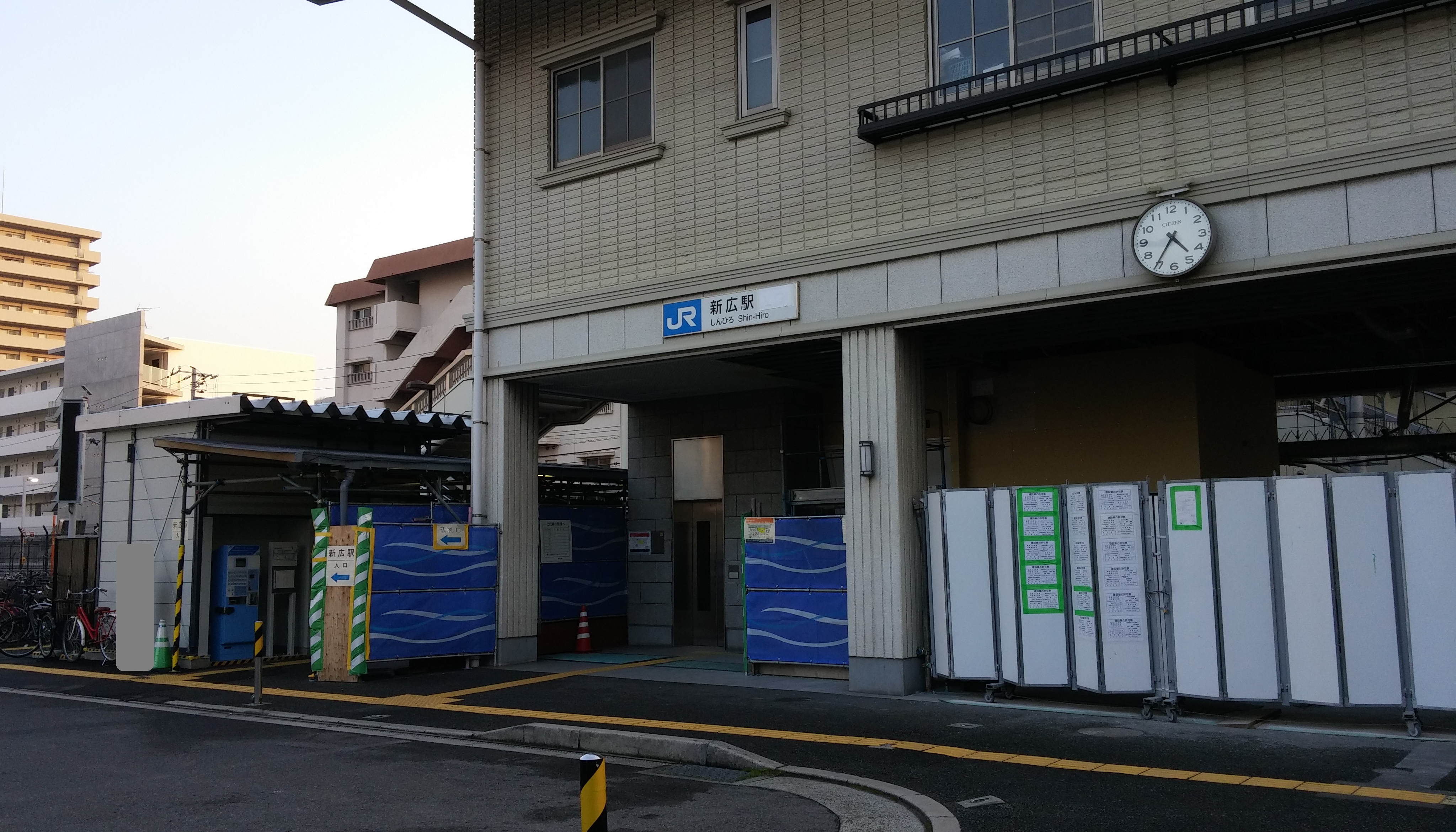 JR新広駅仮駅舎（一部編集）